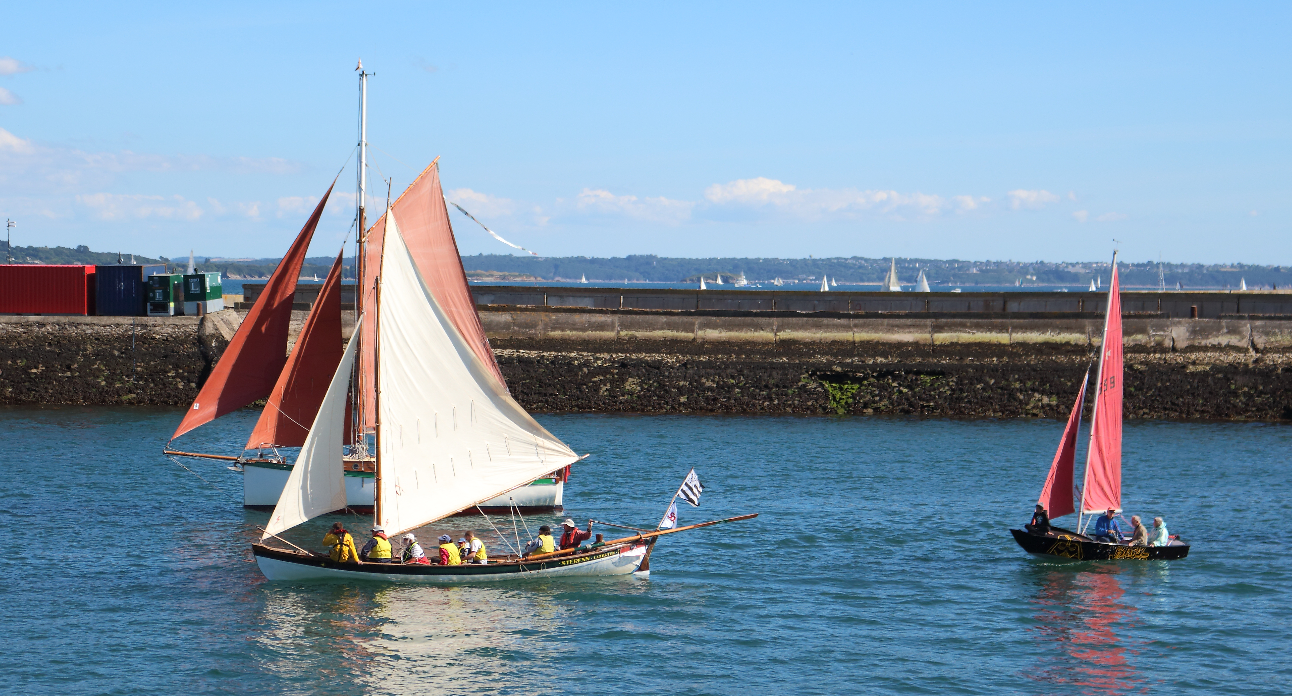 Voiliers de retour de promenade le 14 juillet 2016 pendant les fêtes maritimes de Brest.(Sterenn Lanester en 1° plan